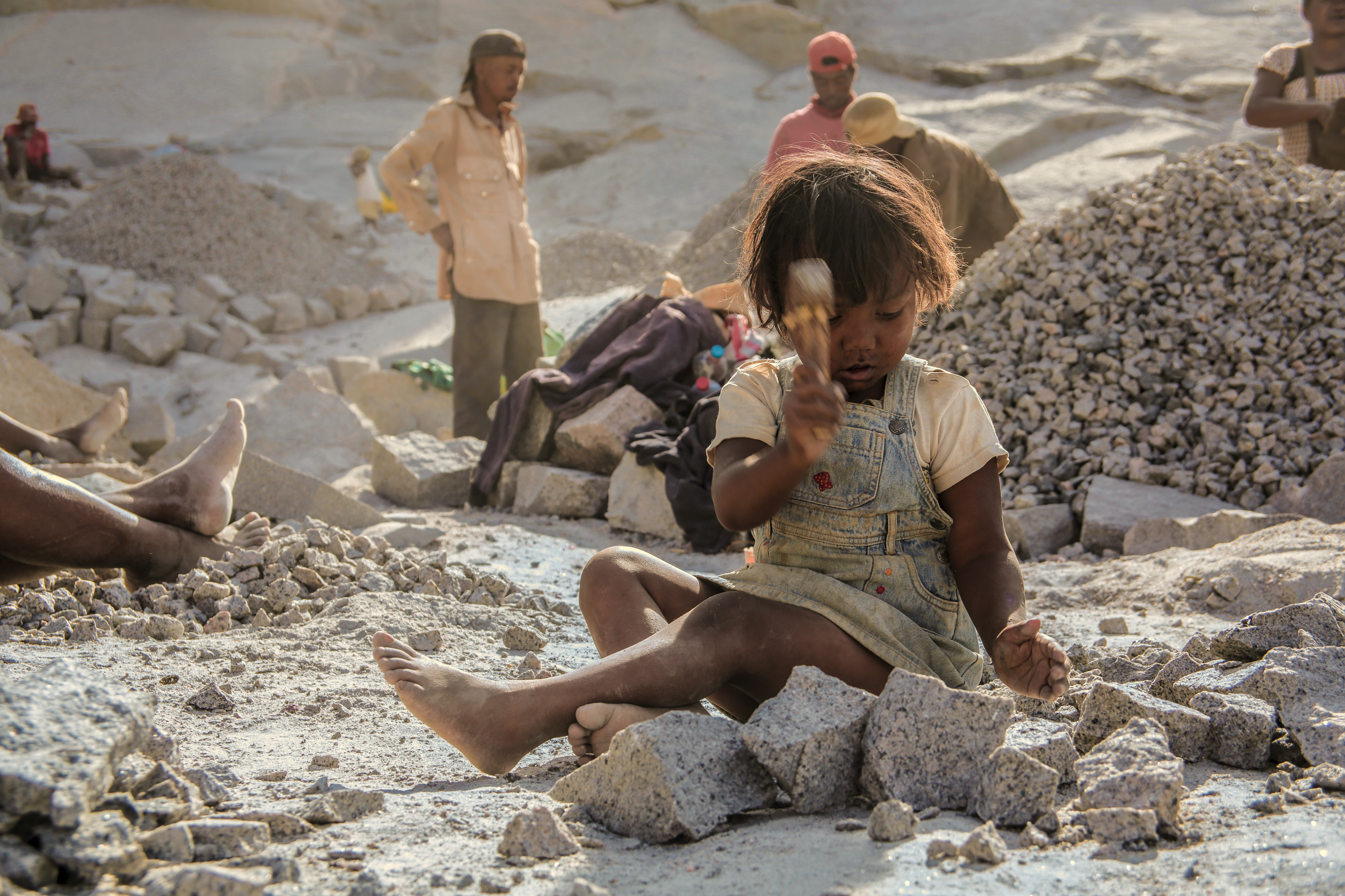 Un enfant jouant à casser des pierres sur la carrière d'Ambatobe (Tananarive Madagascar). Sa mère et son père y travail et elle joue l'apprentie casseur de pierre. This is an image with the theme "Play" from: Madagascar